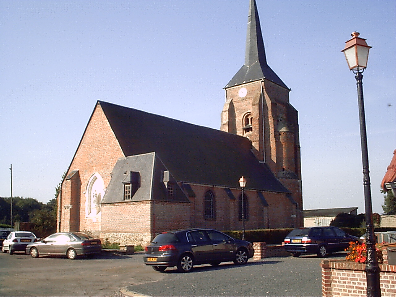 L'église de Valines, Somme, France.